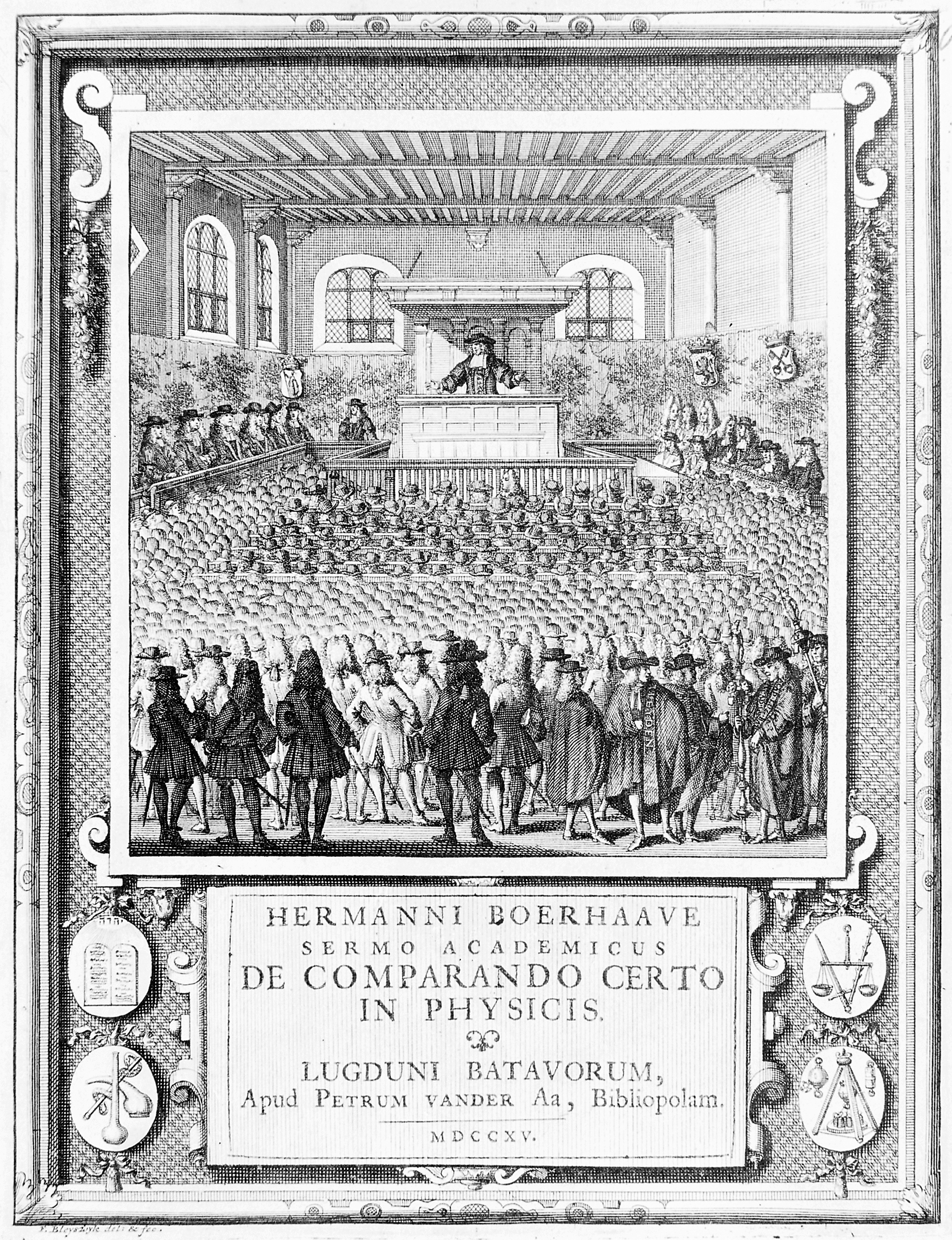 Boerhaave giving a lecture Rare Books Keywords: Boerhaave, Hermann